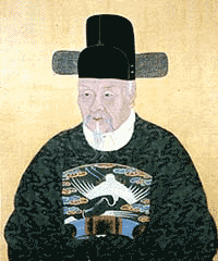 몽와 김창집 영정